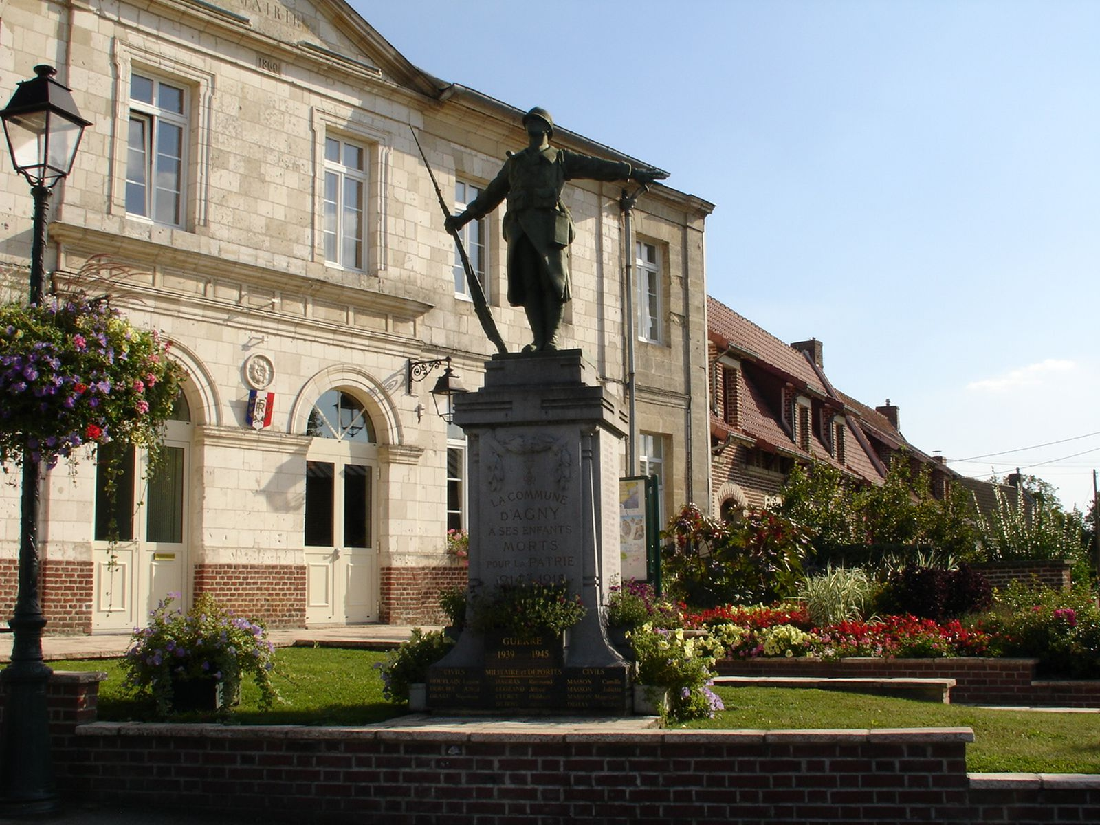 Monument aux morts d'Agny